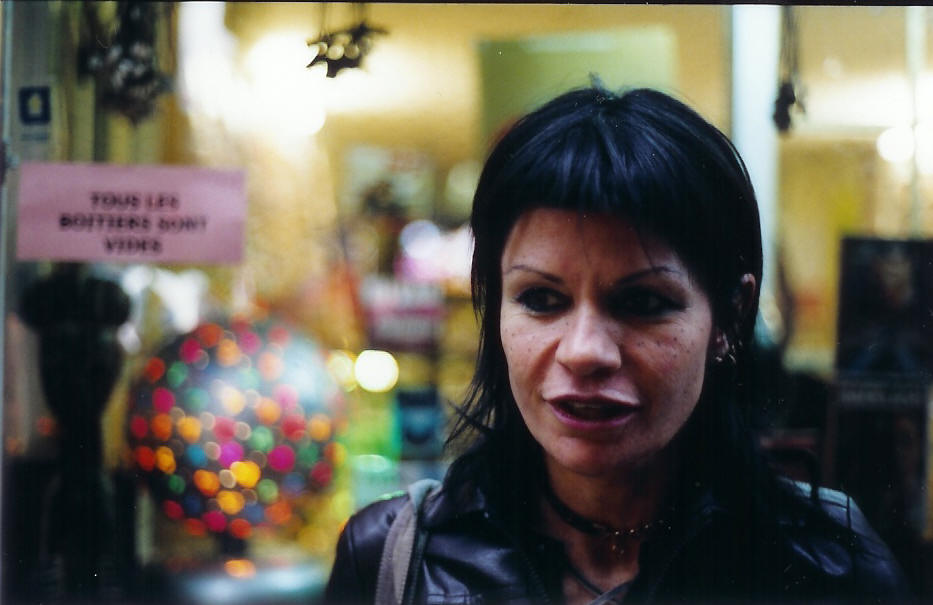 Emmanuelle Jowa, auteur du Somnambule Equivoque